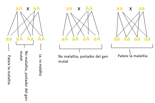 Tres casos d'herència autosómica.1.Els primogènits són heterozigots. 2.Primogènits homozigots (un recessiu i l'altre dominant). 3. Primogènits homozigotsrecessius